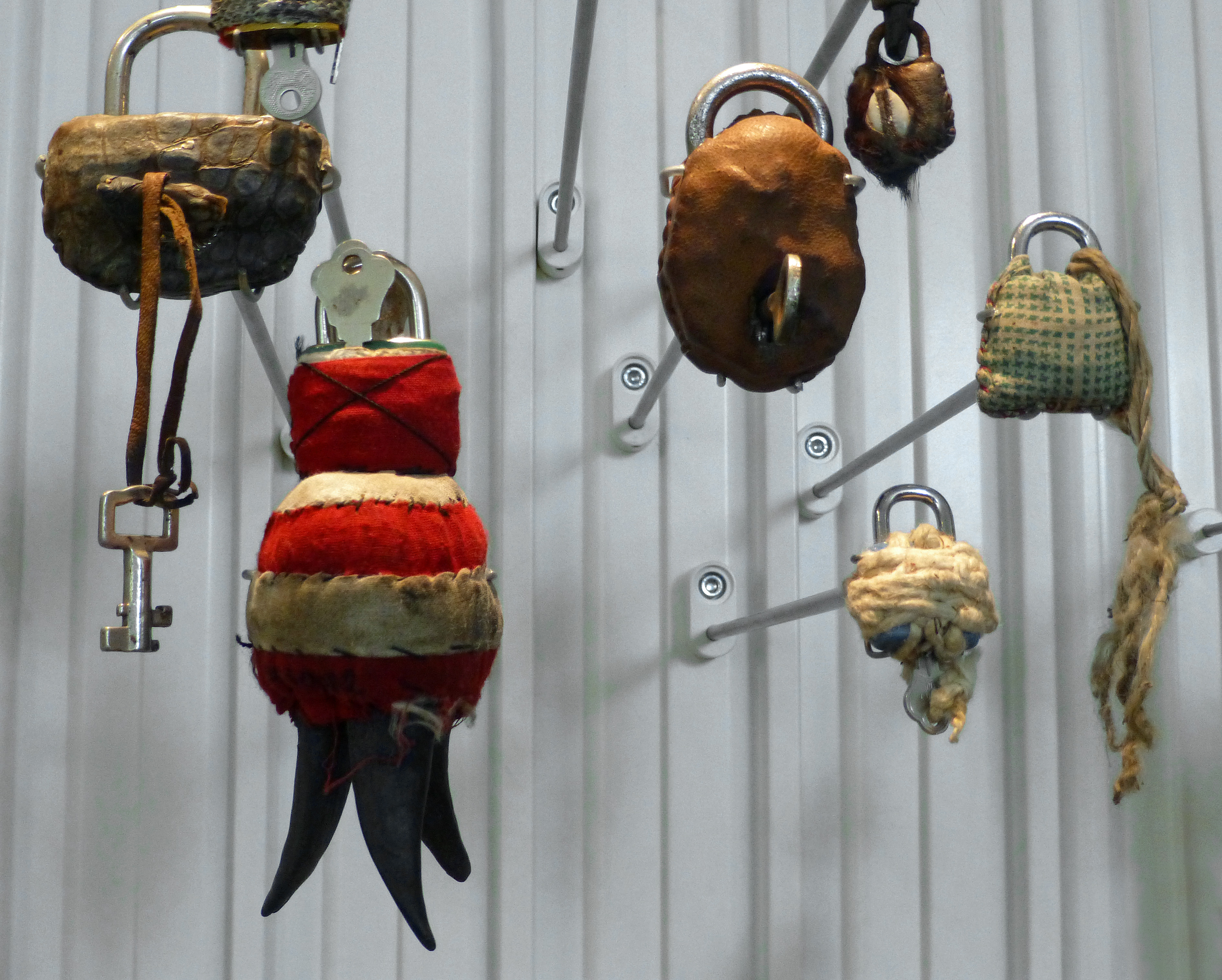 Amulettes confectionnées à partir de cadenas, collectées sur une décharge à ordures de Pikine (Dakar, Sénégal). Musée de l'Homme, Paris.